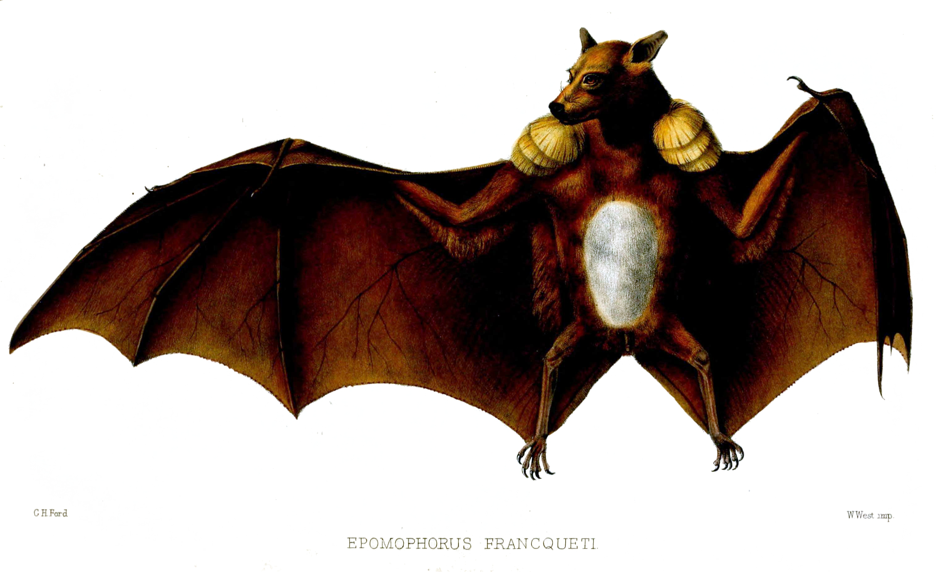 Epomophorus francqueti= Epomops franqueti